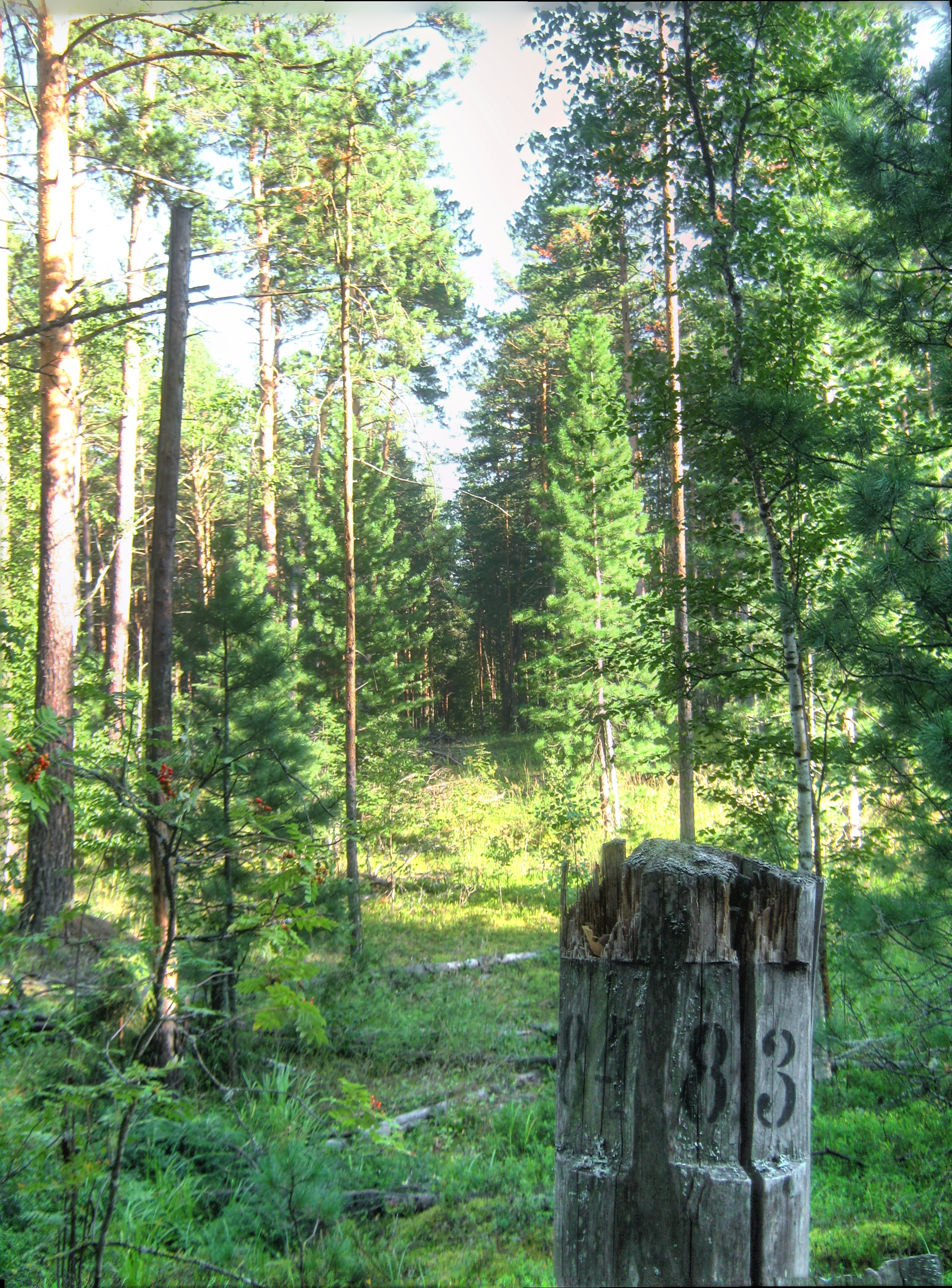 Темерчинское урочище - квартальный столб. Кварталы 83, 84, 96, 97 (110).